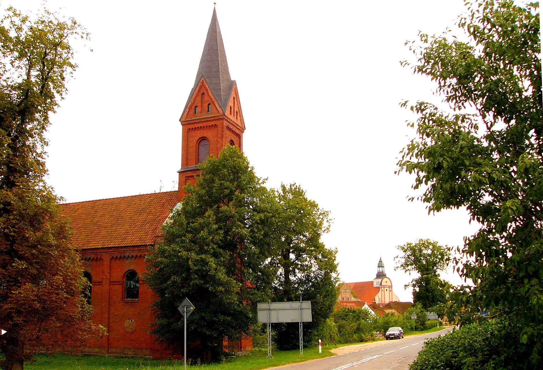 Bisztynek, ul. 9 Maja - dawny kościół ewangelicki, obecnie kościół pw. św. Michała Archanioła (zabytek nr A-1512)